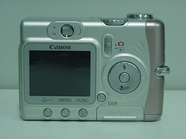 Appareil photographique numérique Canon PowerShot A510 - Vue arrière